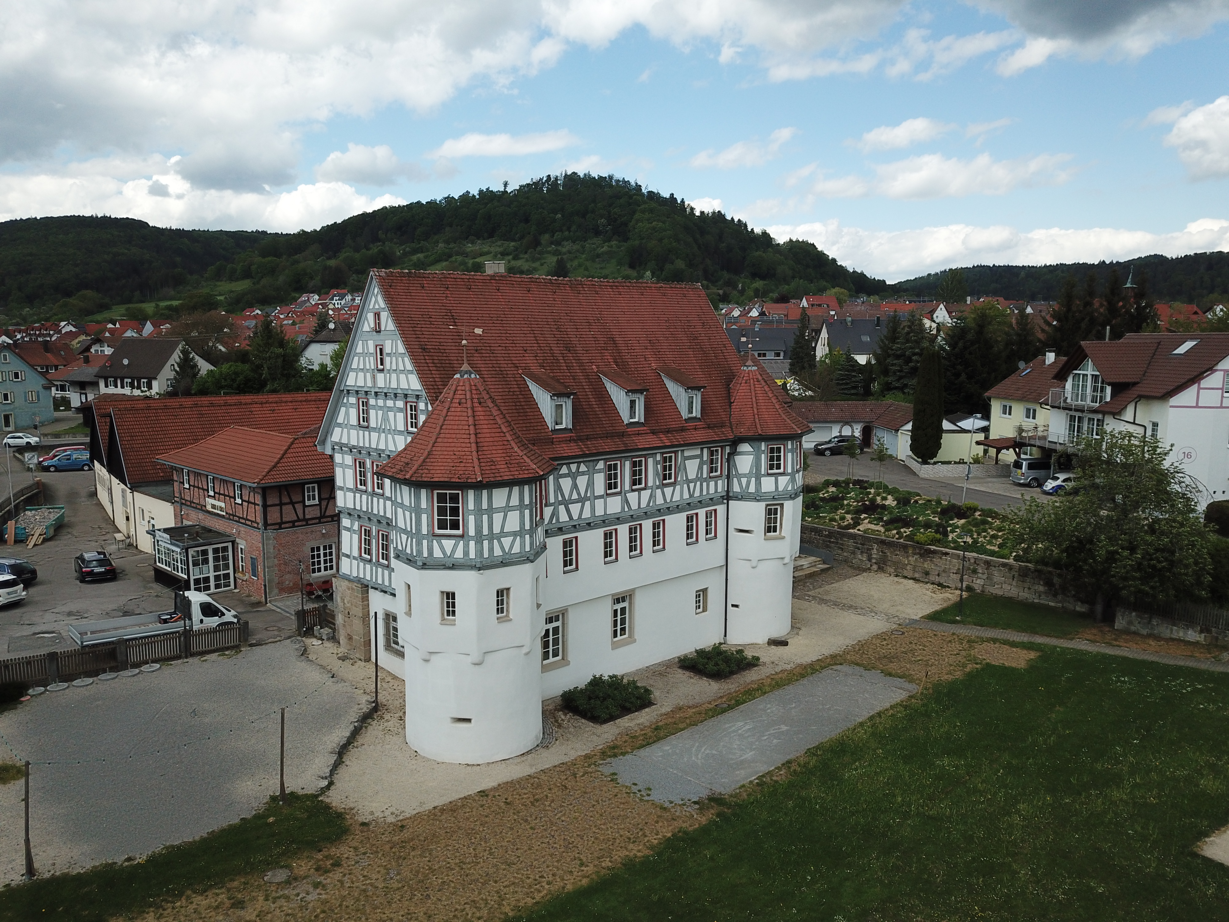 Das Sulzbacher „Schlössle“ im April 2020.